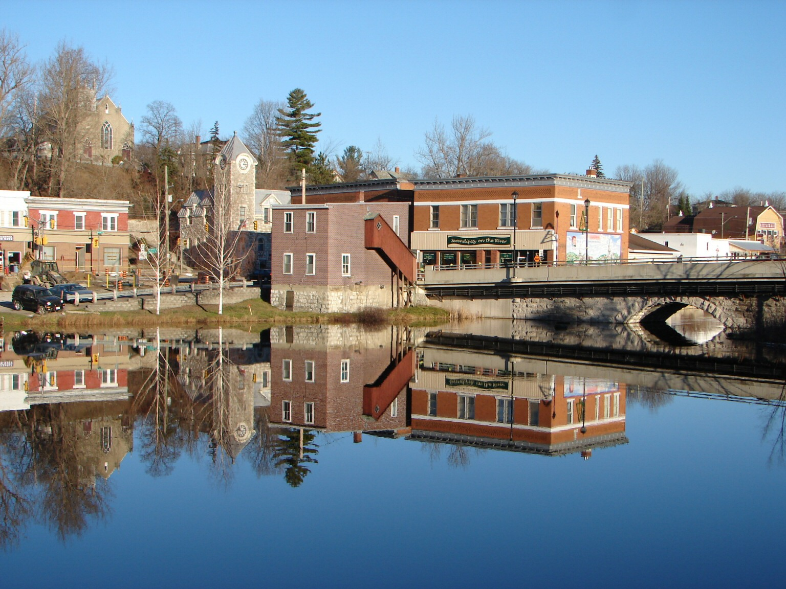 Eganville, Ontario, Canada